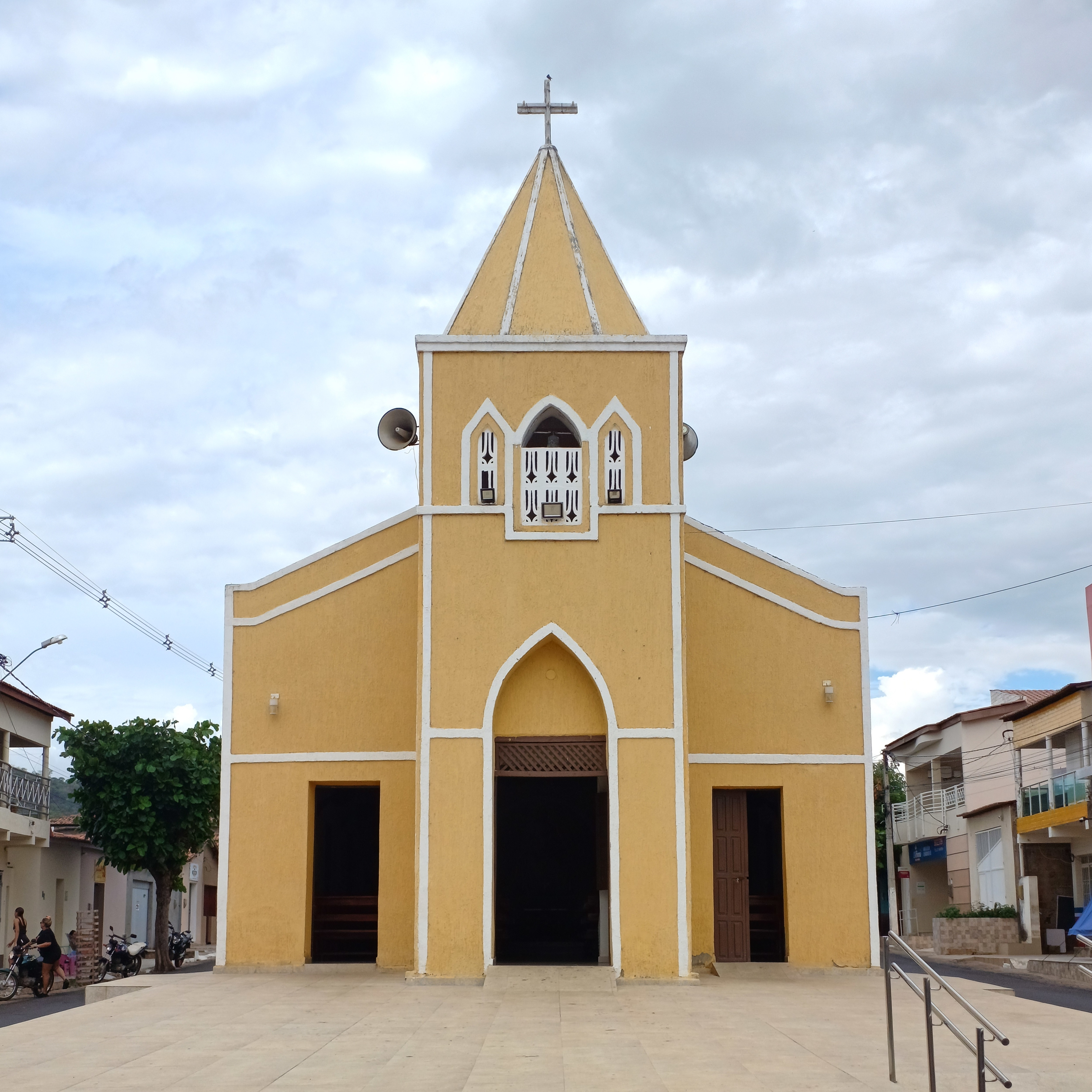 Capela de Nossa Senhora de Fátima, da paróquia de São Francisco de Assis de José da Penha, em Água Nova, Rio Grande do Norte (Brasil).